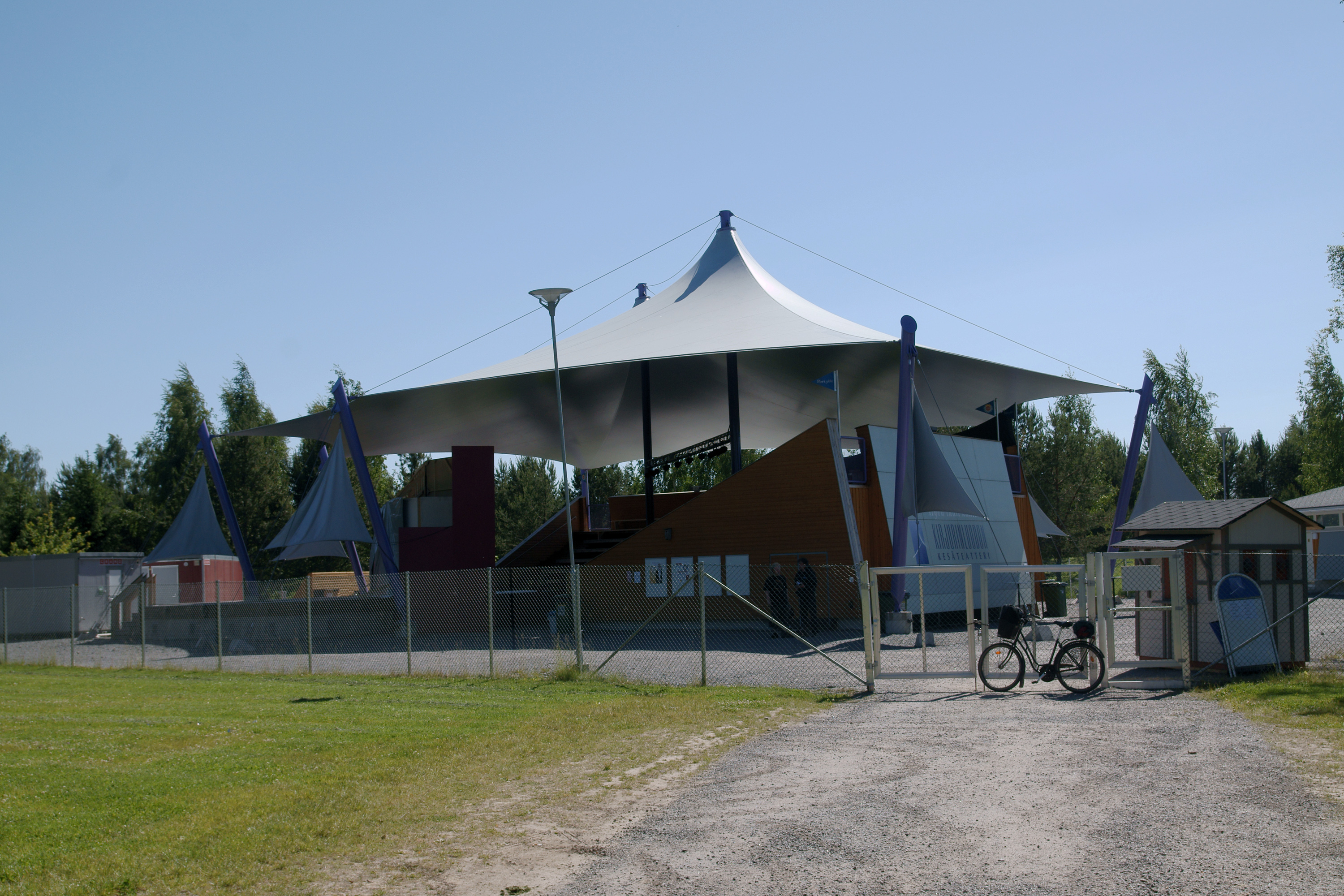 Kirjurinluodon kesäteatteri.